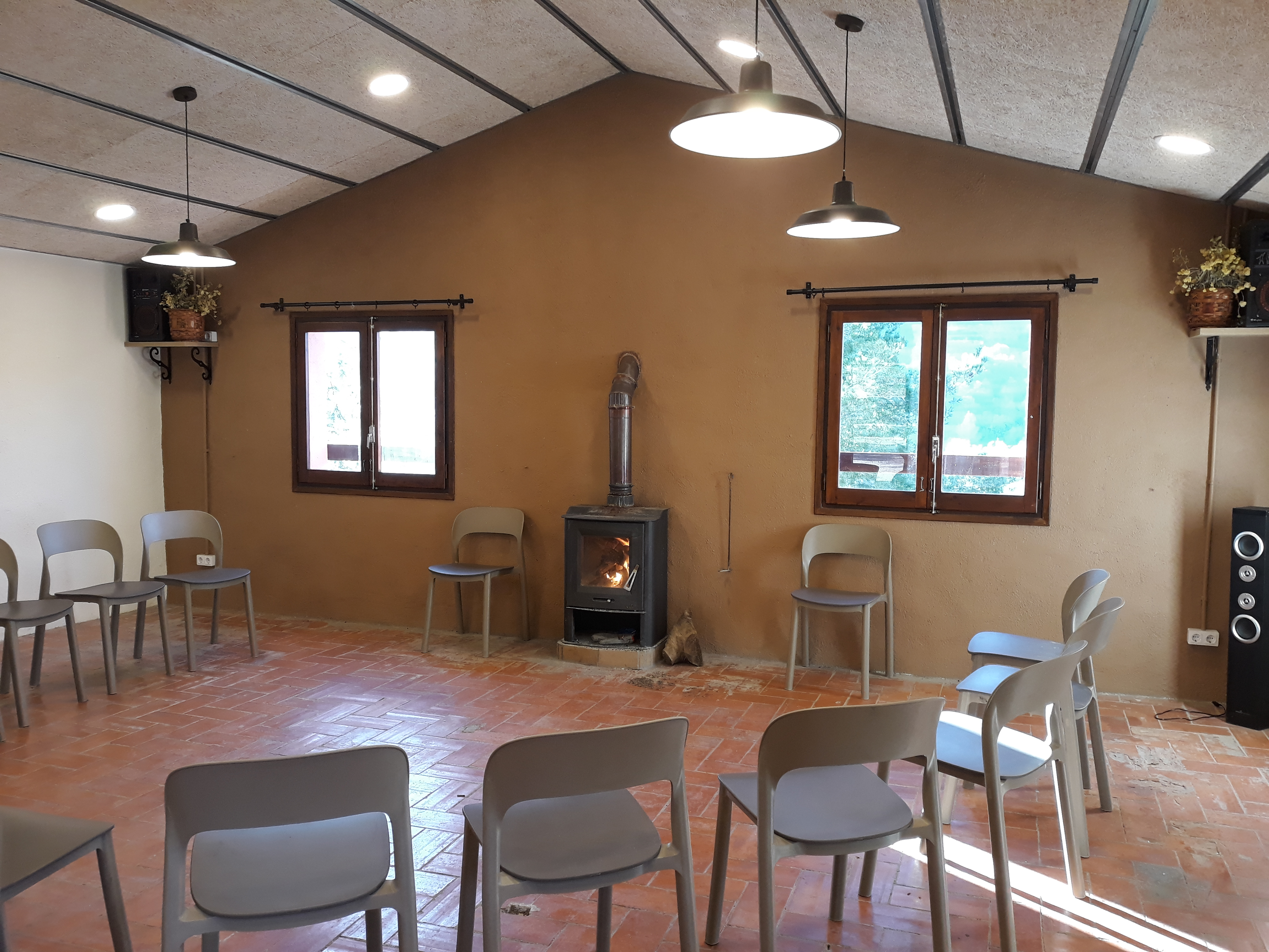 Aula Natura on es realitzen activitats ocupacionals i formatives de la Fundació Ginac.